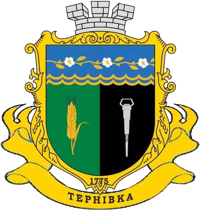 Герб Тернівки